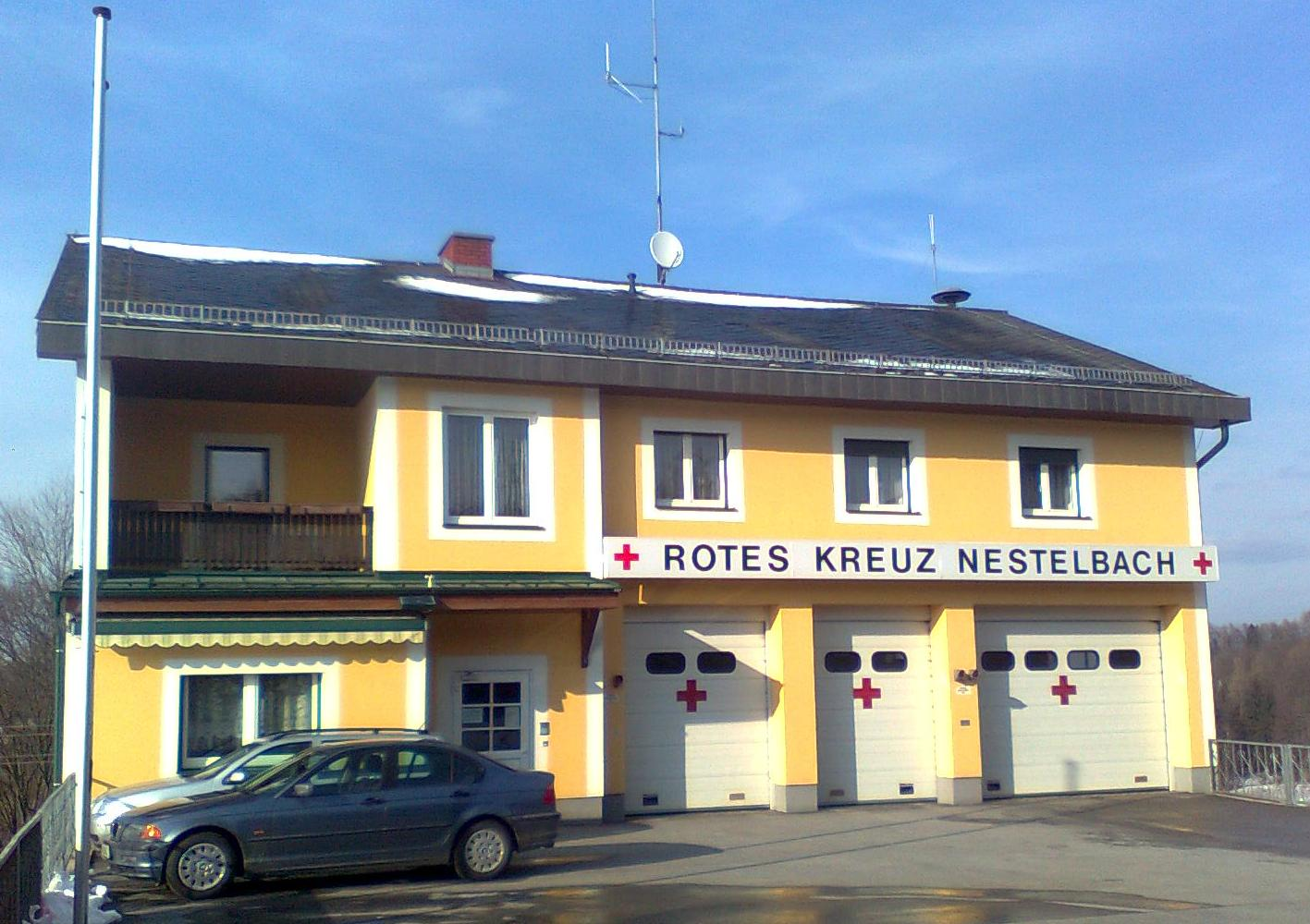 Ortsstelle des Österreichischen Roten Kreuzes in Nestelbach bei Graz